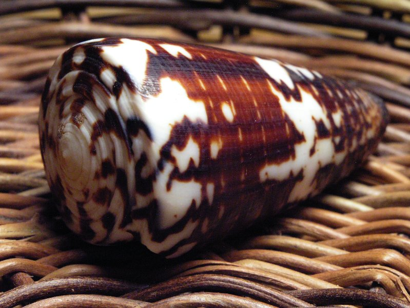 Conus generalis Linneaus, 1768